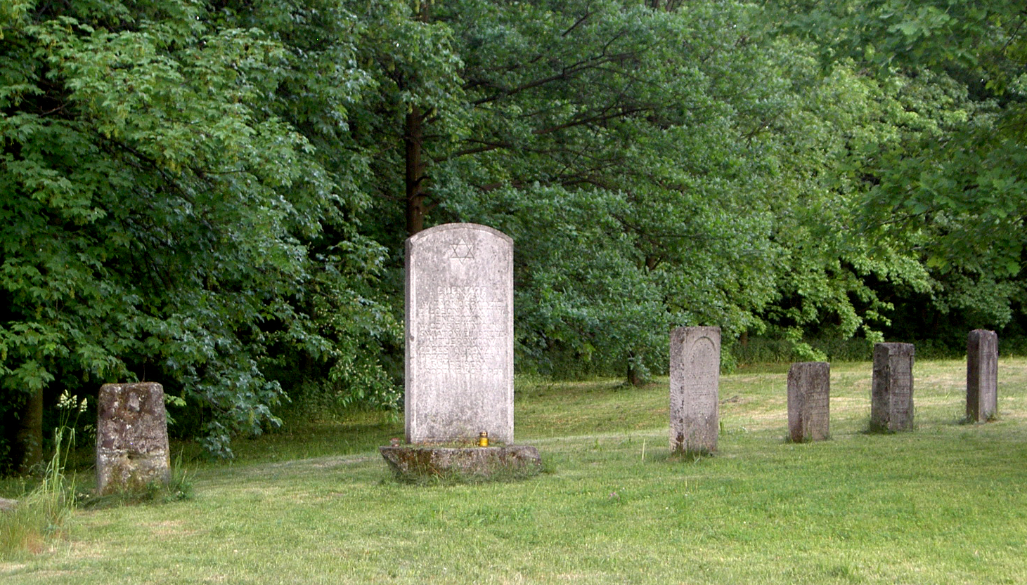 Tarnogród, Poland - Jewish cemetary • Tarnogród, Polska - Kirkut